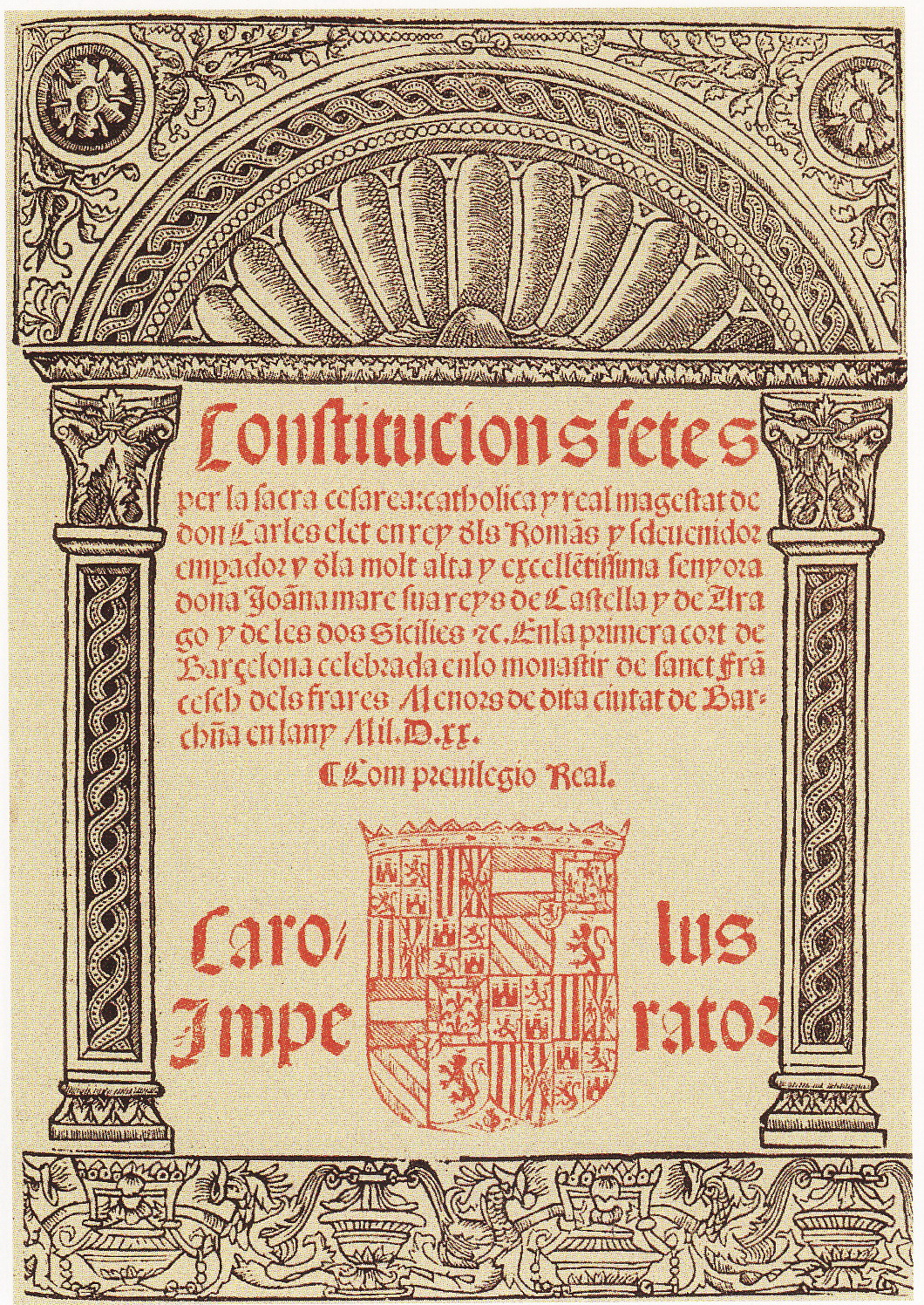 Constitucions, capítols i actes de Cort de les Corts de Barcelona de 1519-1520 presidides per Carles V del Sacre Imperi Romanogermànic (Carles I d'Espanya).